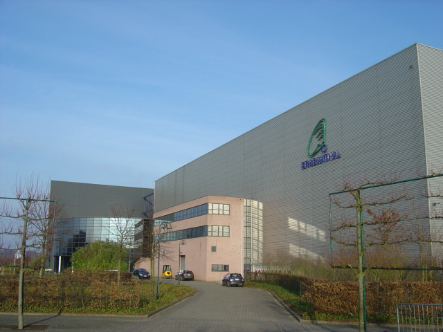 Brabanthal Leuven hoofdingang. Eigen foto Ben Pirard, GFDL. 31 januari 2007